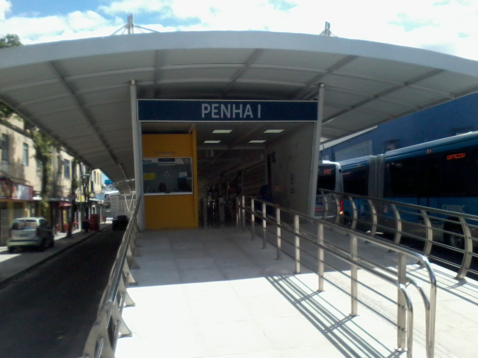 Uma das entradas da Estação Penha 1, localizada ao lado de uma agência da Caixa e em frente a Rua Ibiapina